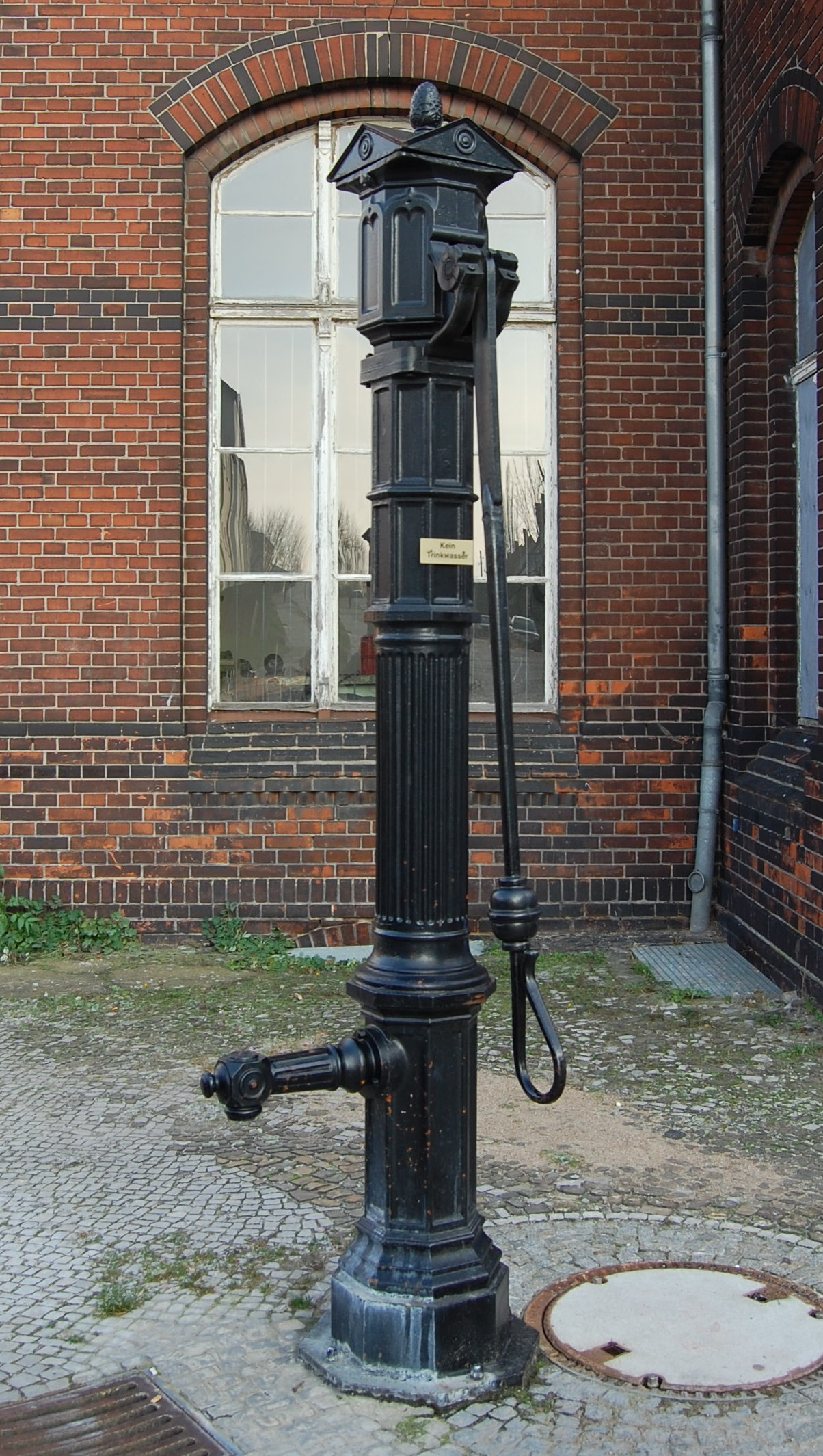 Pumpe vor dem Bahnhof Magdeburg Südost